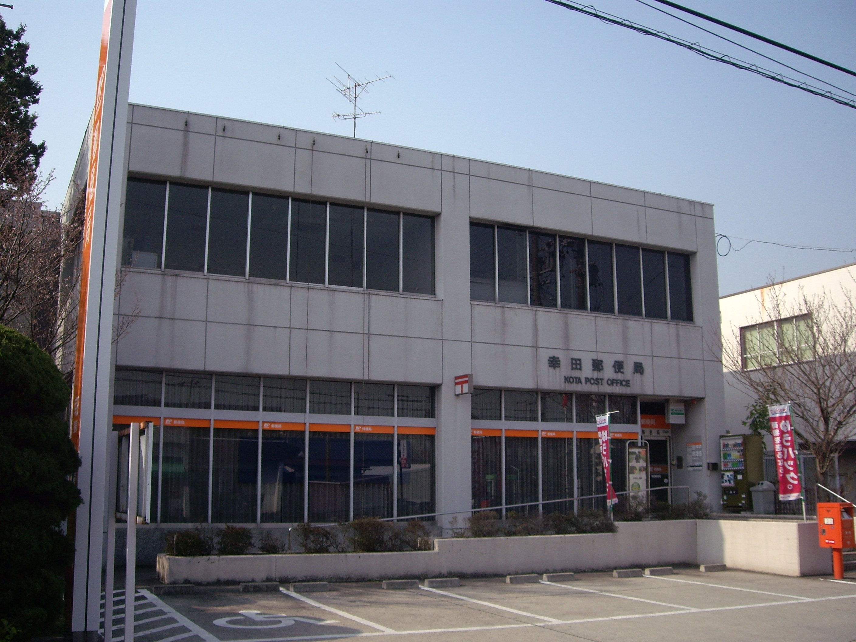 幸田郵便局（愛知県） - 開局前に撮影